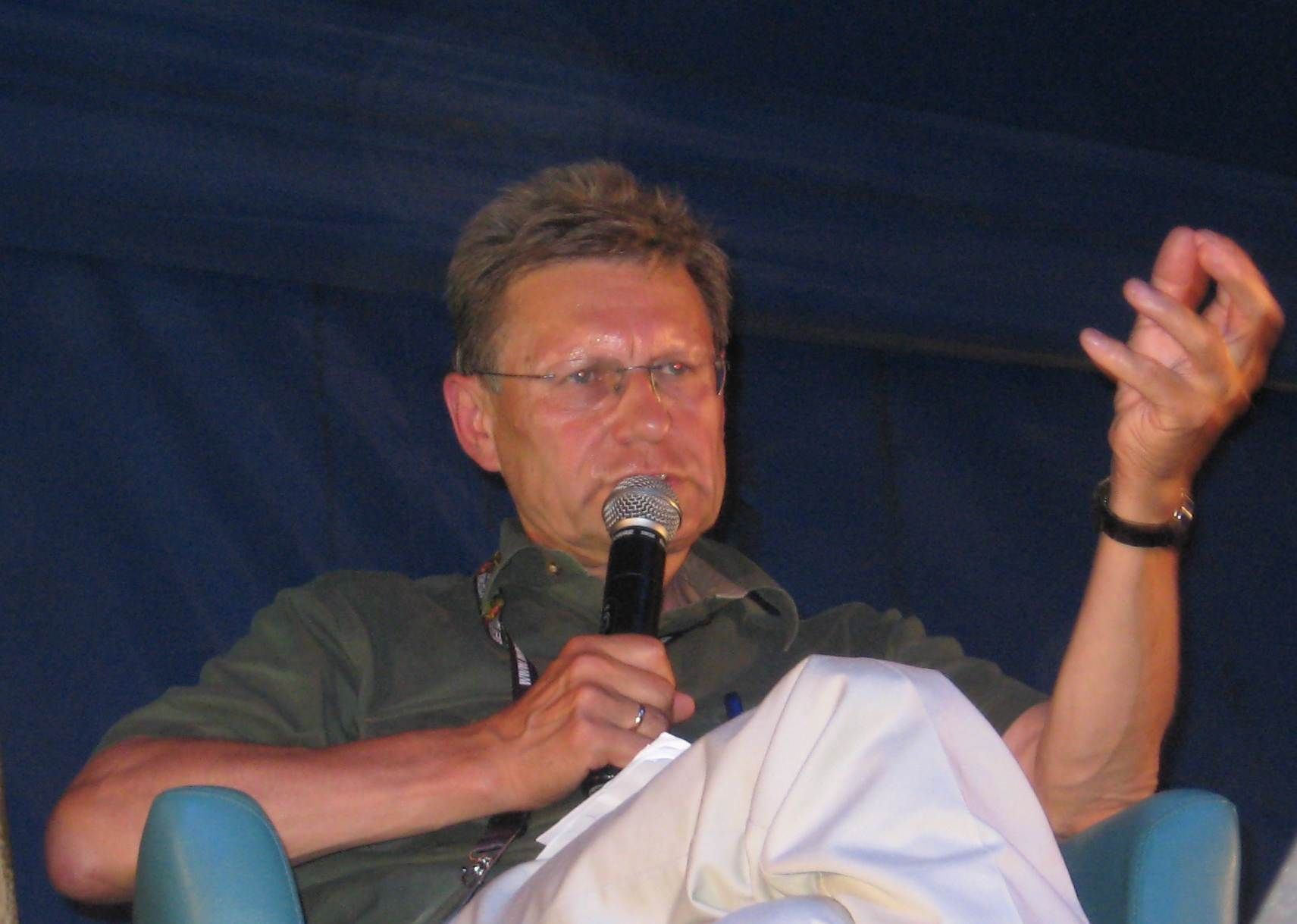 Leszek Balcerowicz auf der Haltestelle Woodstock (Przystanek Woodstock) im Jahr 2008.